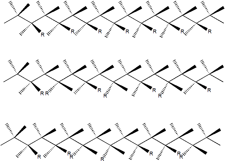 Tacticidad de los diferentes polímeros